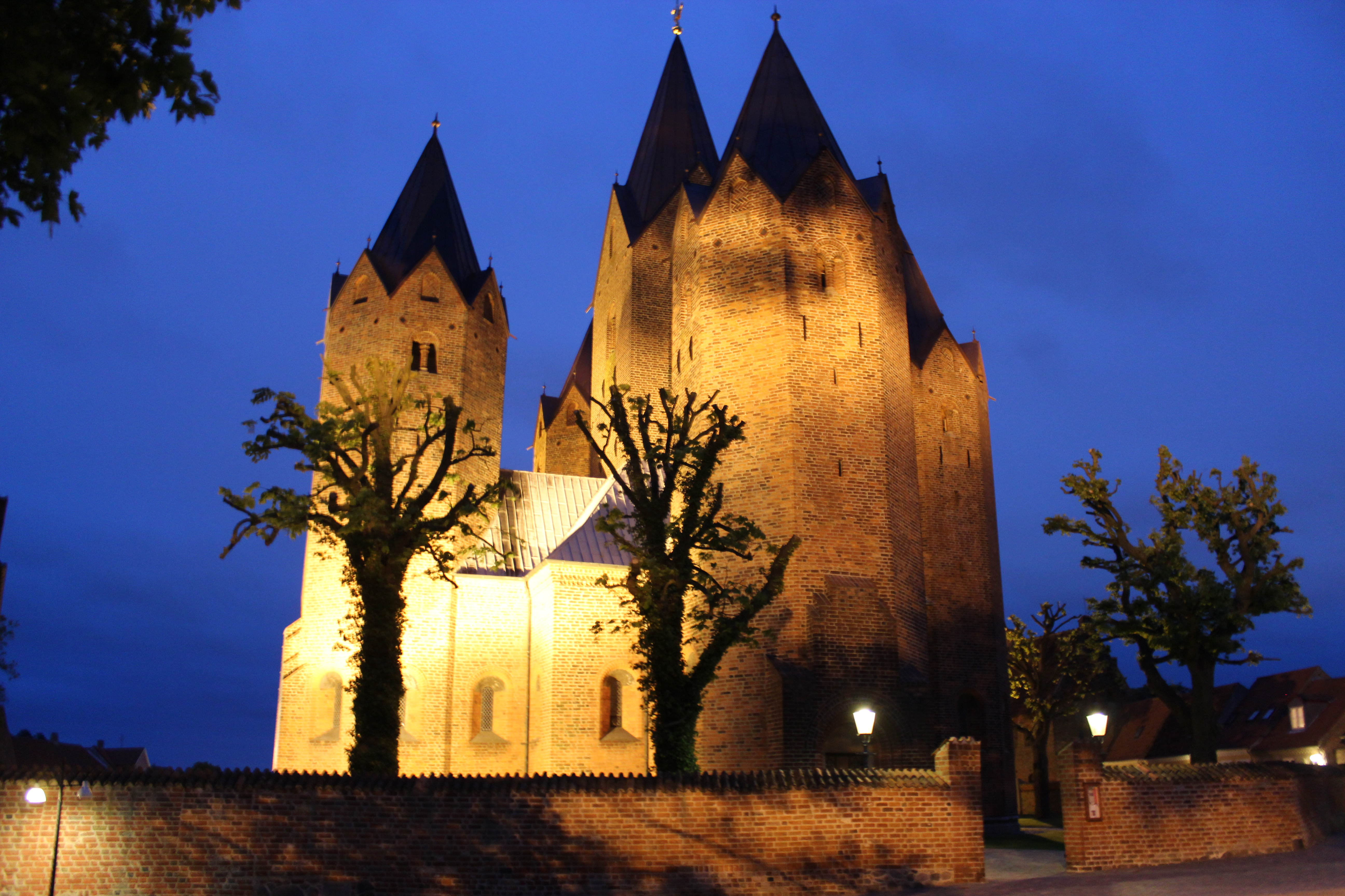 Vor Frue Kirke ved aftentid